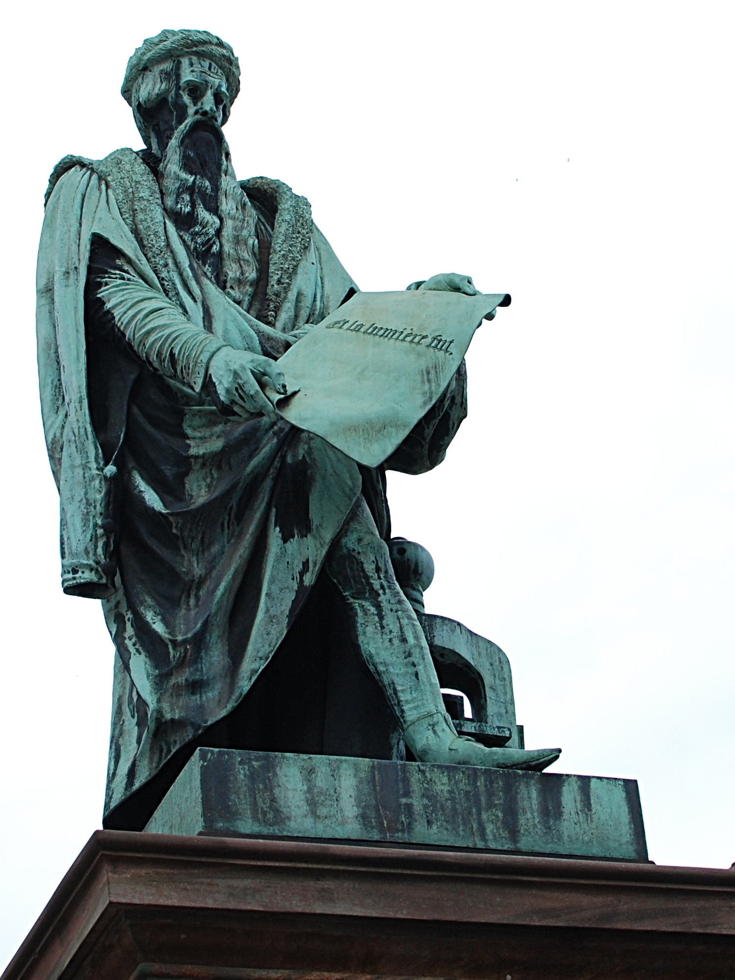 Statue de Gutenberg à Strasbourg